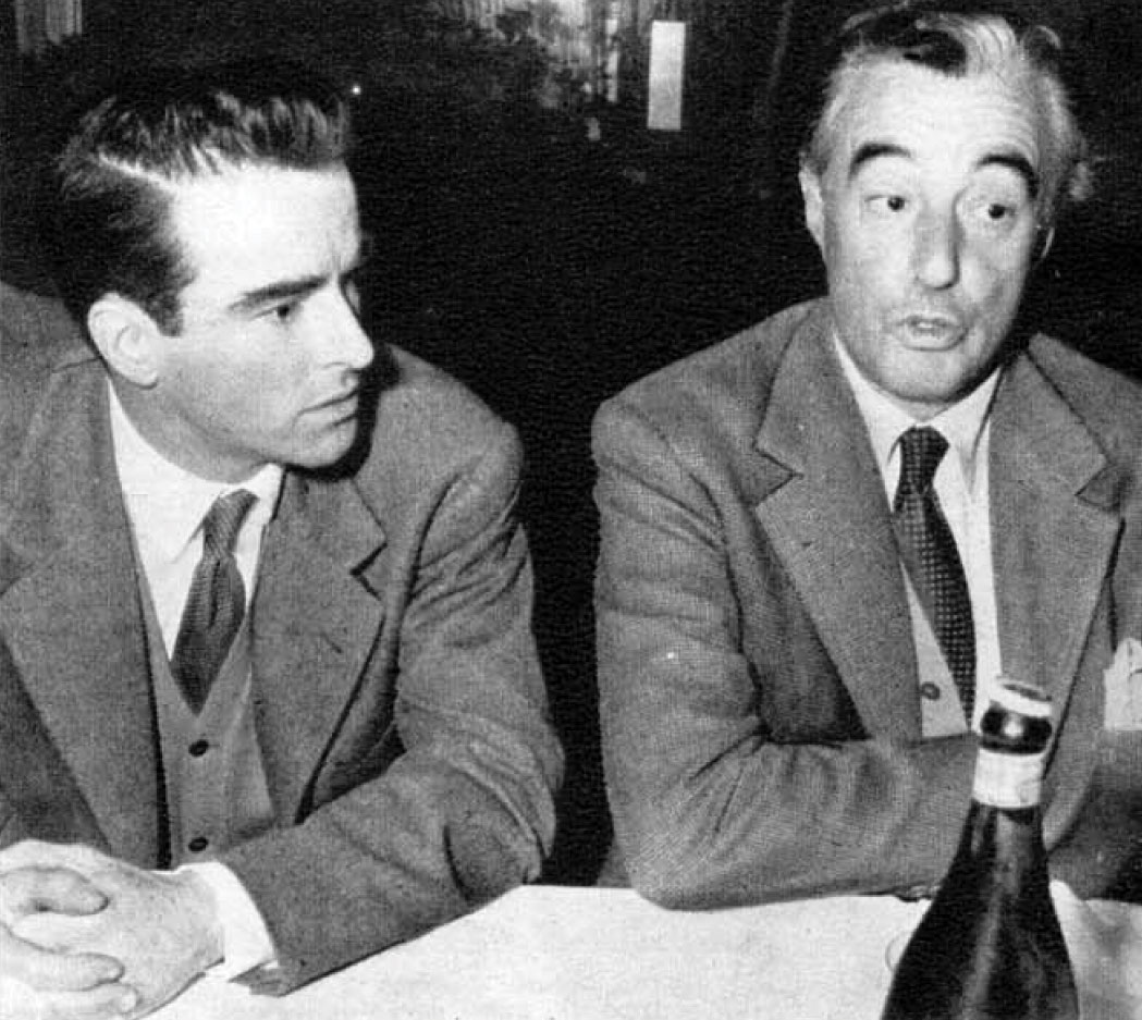 Montgomery Clift e Vittorio De Sica parlano del film Stazione Termini.